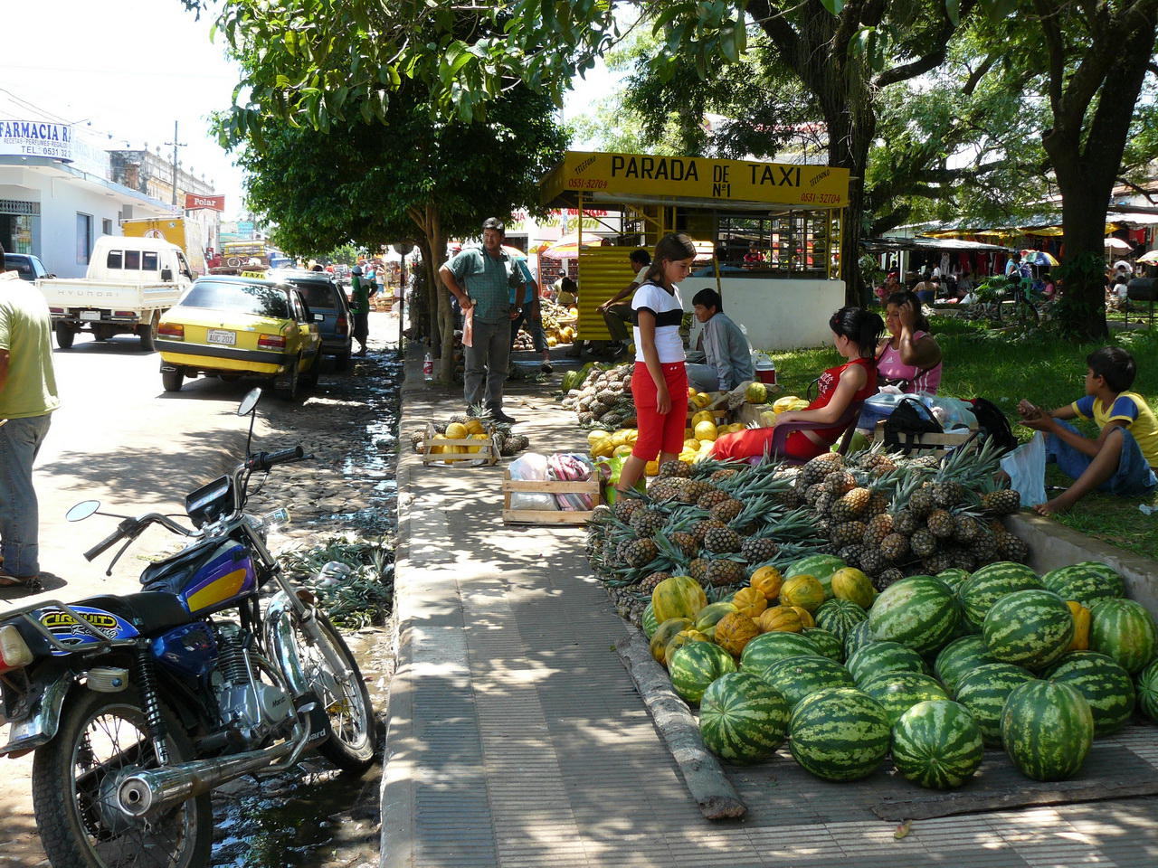 Fotos tomadas por mí, a inicios del año 2008 mercado de frutas en paraguari